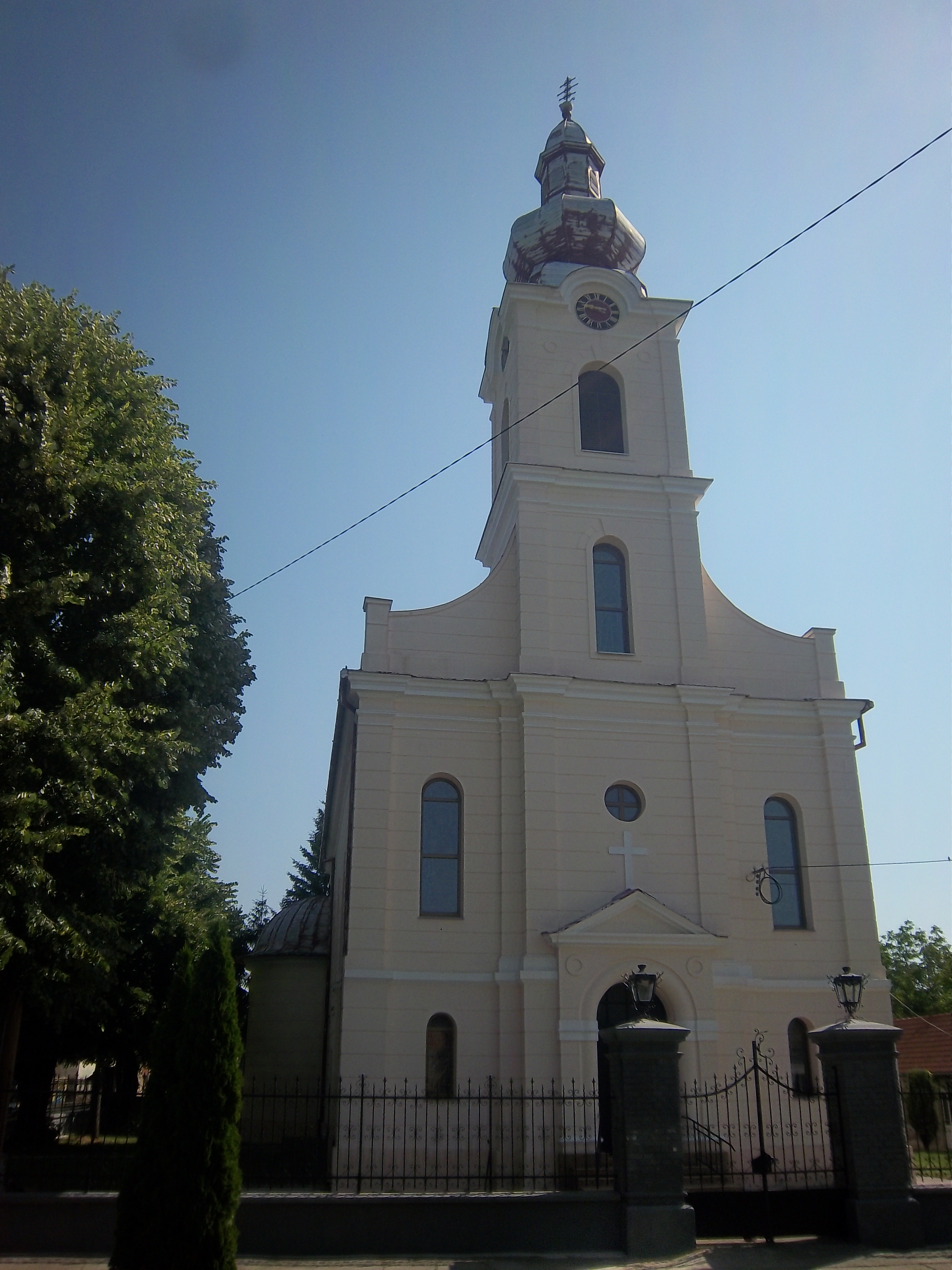 Српски (ћирилица): Гркокатоличка црква у селу Миклушевци у источној Славонији (Општина Томпојевци, Република Хрватска).